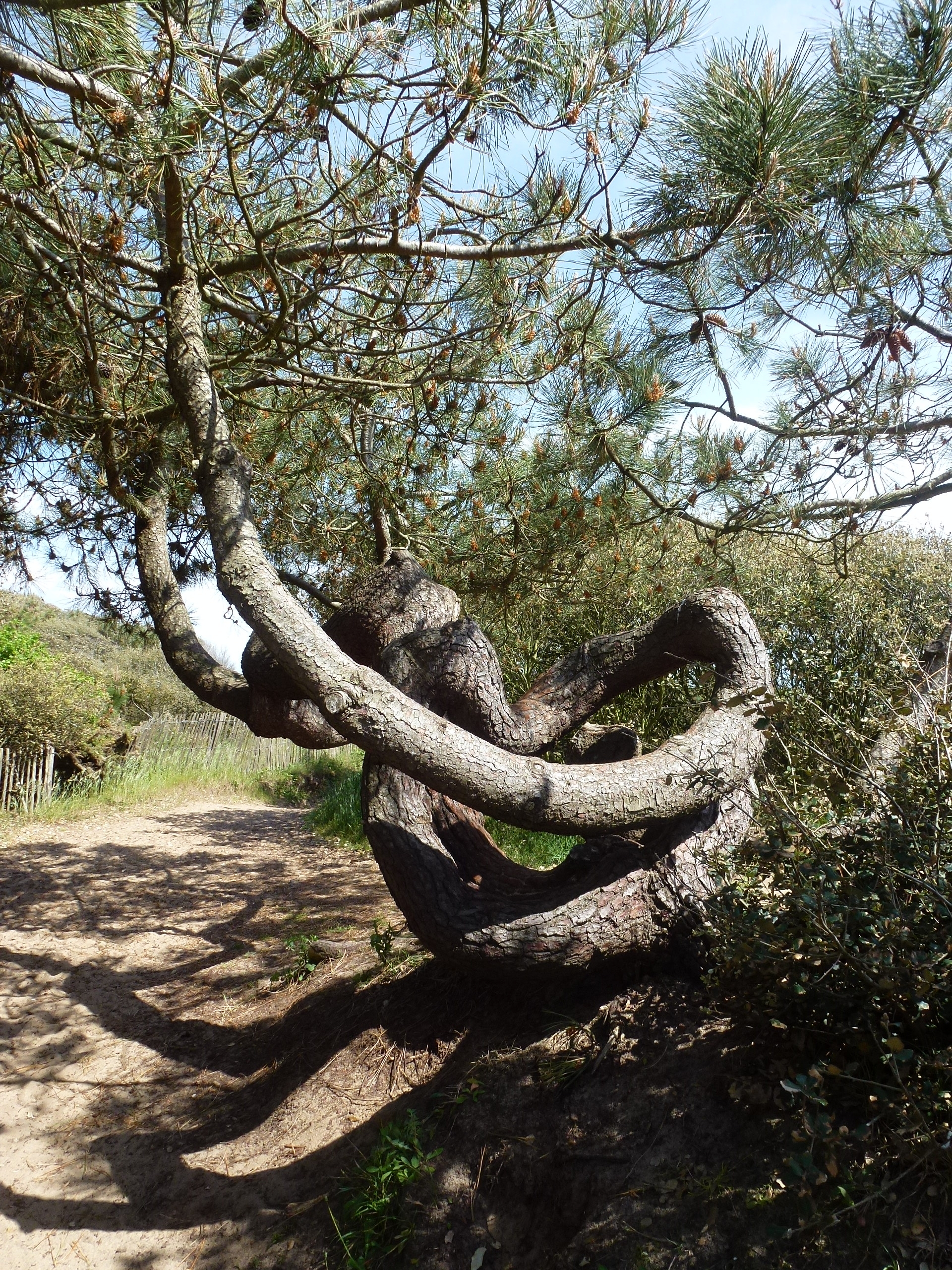 Le bois de la Mine à Port Bourgenay, Talmont-Saint-Hilaire (leTalmondais), Vendée.- France